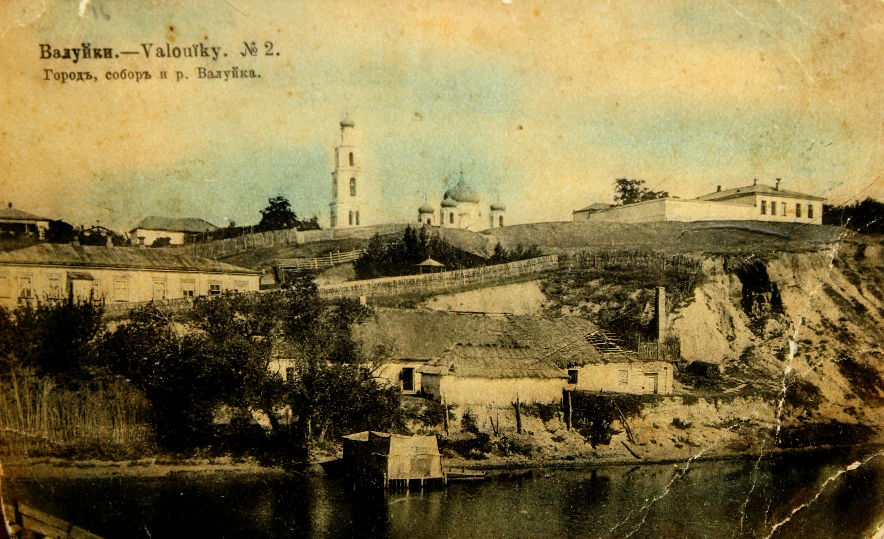 Фотография начала 20-го века. Изображен город Валуйки. Виднеется также Валуйский Владимирский собор, разрушенный в 1932 году.